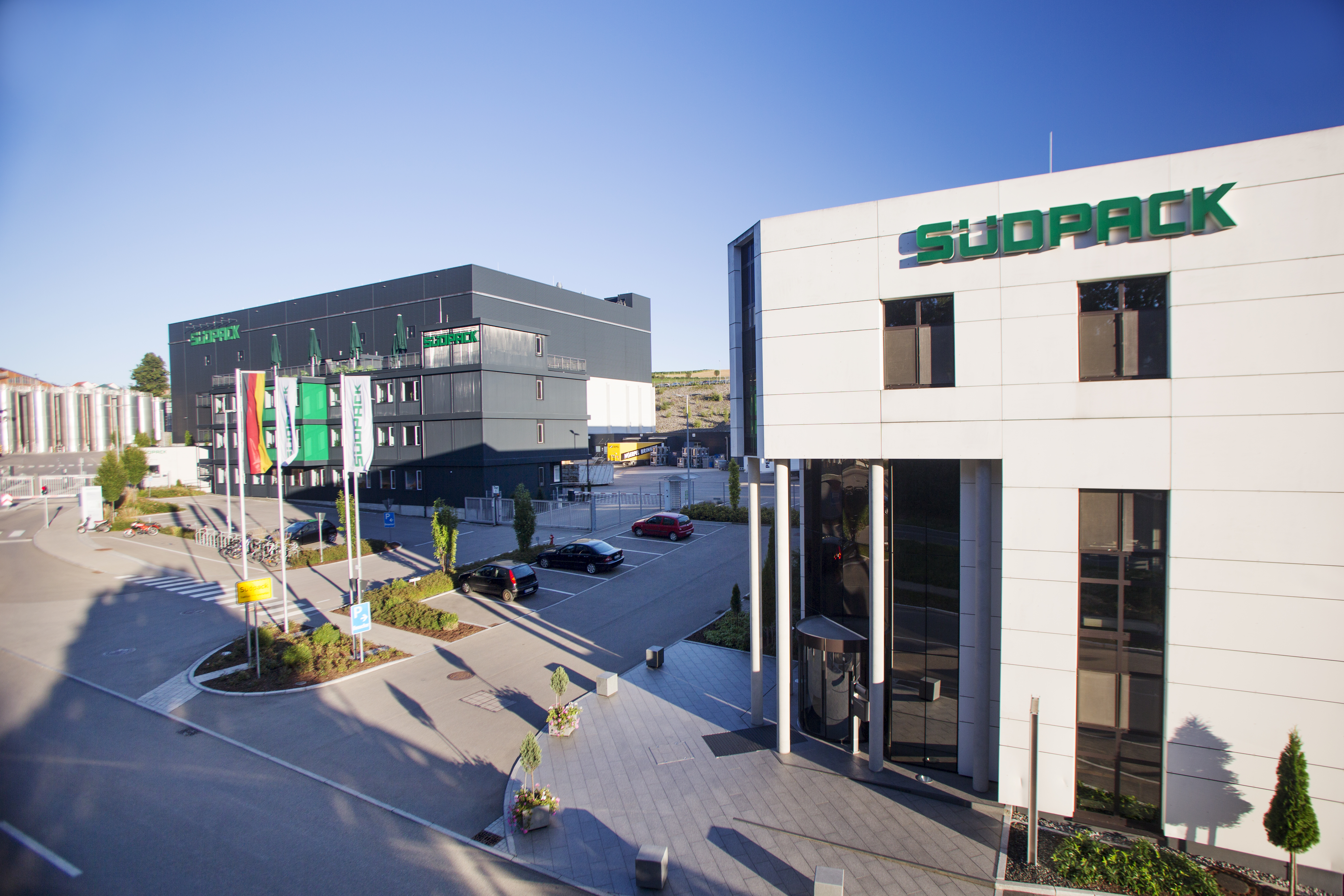 Neue Halle BA14